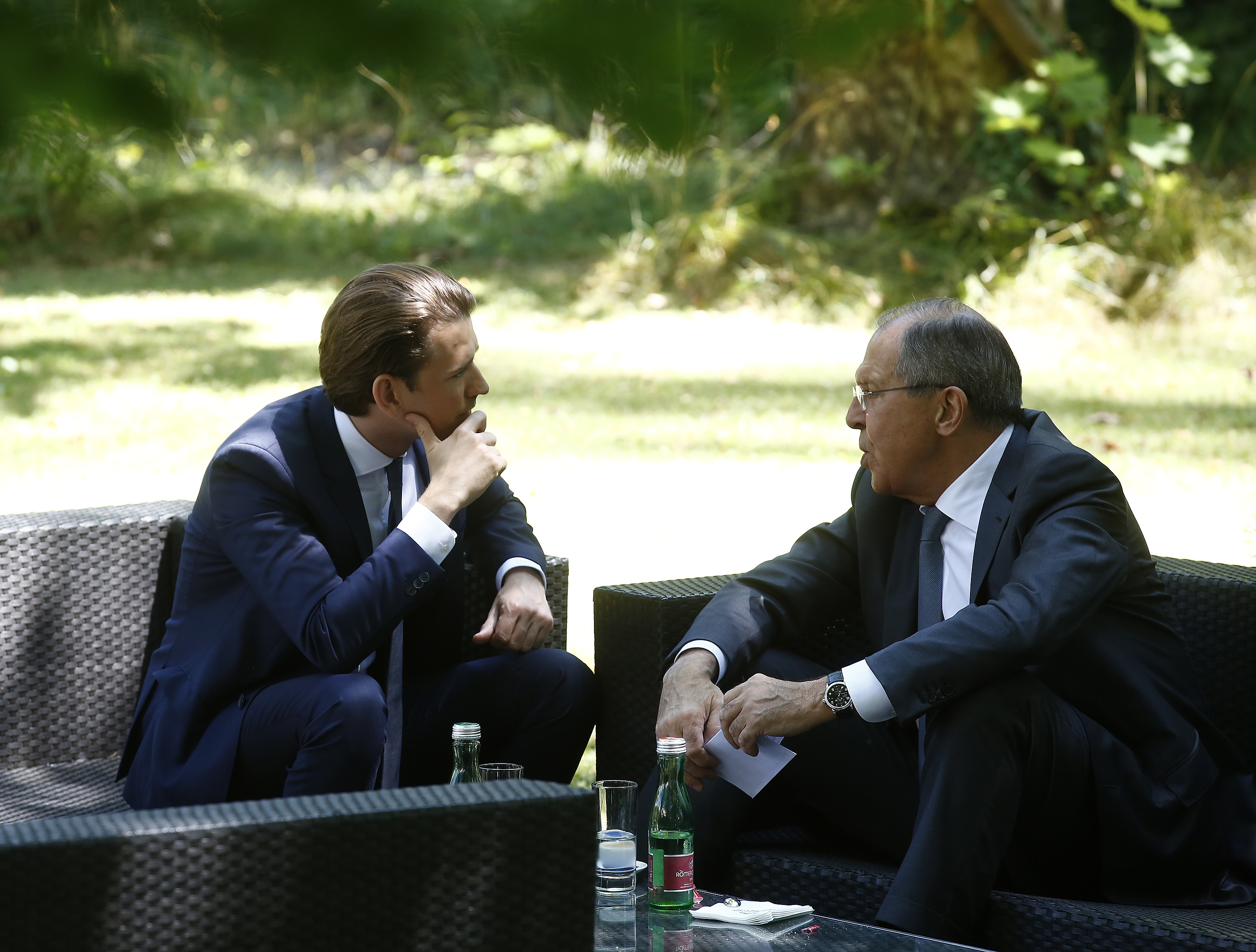 Sebastian Kurz im Gespräch mit dem russischen Außenminister Sergei Wiktorowitsch Lawrow in Mauerbach am 11. Juli 2017